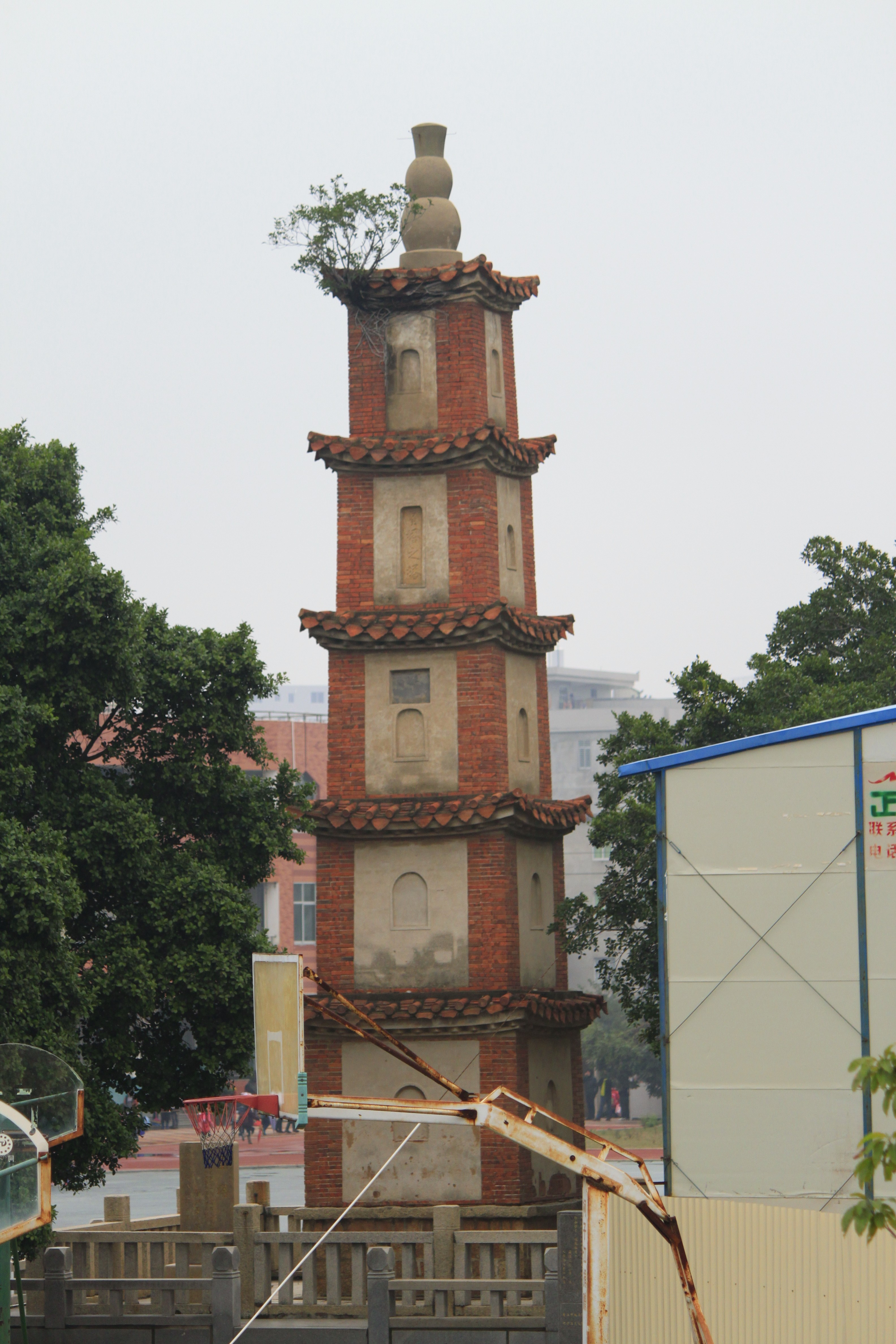 星塔，位于中国福建省晋江市安海镇，是福建省文物保护单位。